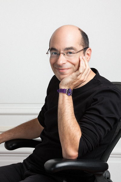 Bernard Werber vu par Michel Restany